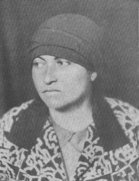 La Poetisa chilena Gabriela Mistral en 1926. Autor: revista Familia (Santiago, Chile : 1910)